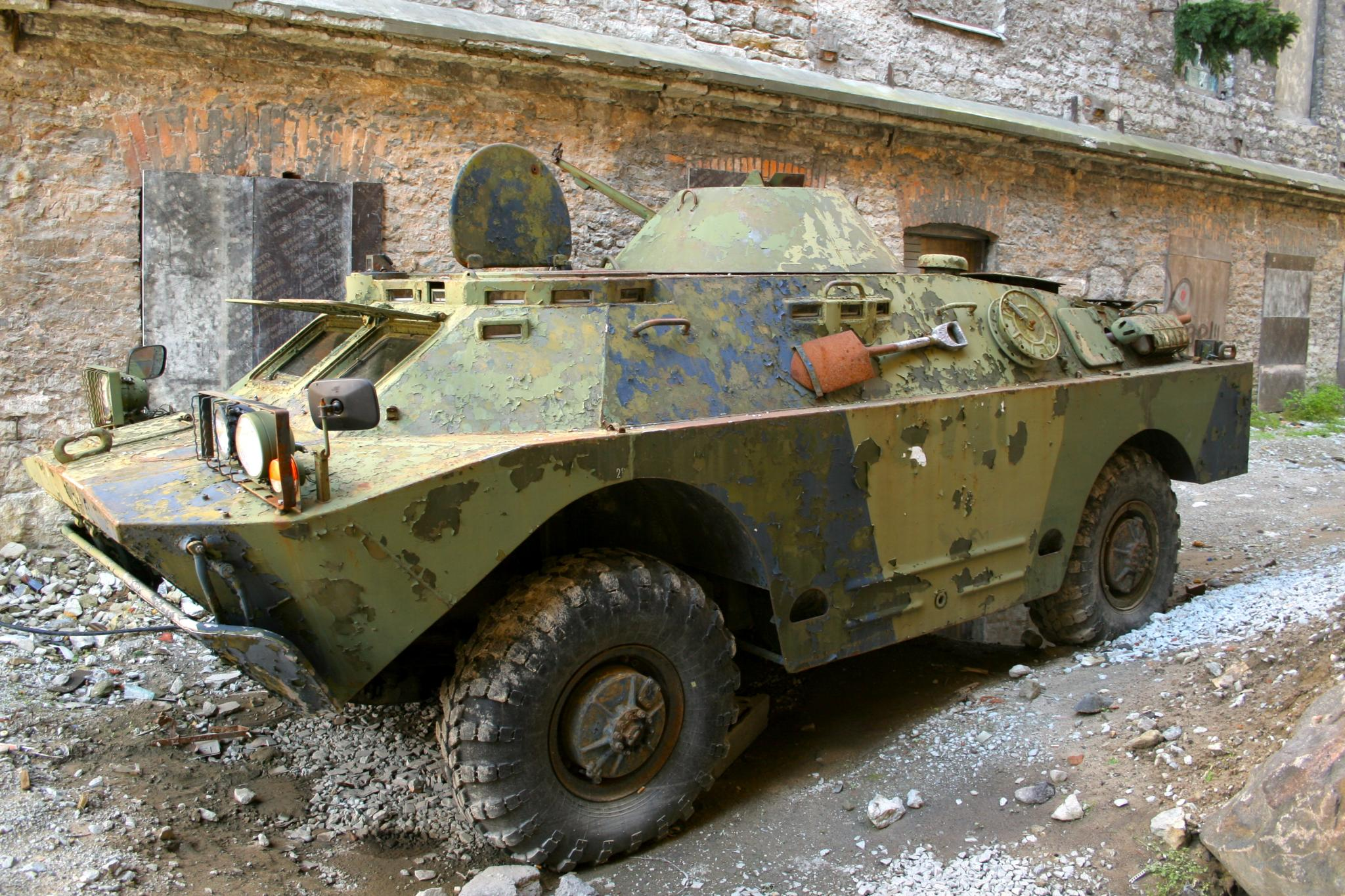 Nõukoguide Tehnika Näitus